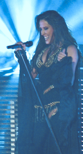 Malú Gira 2013